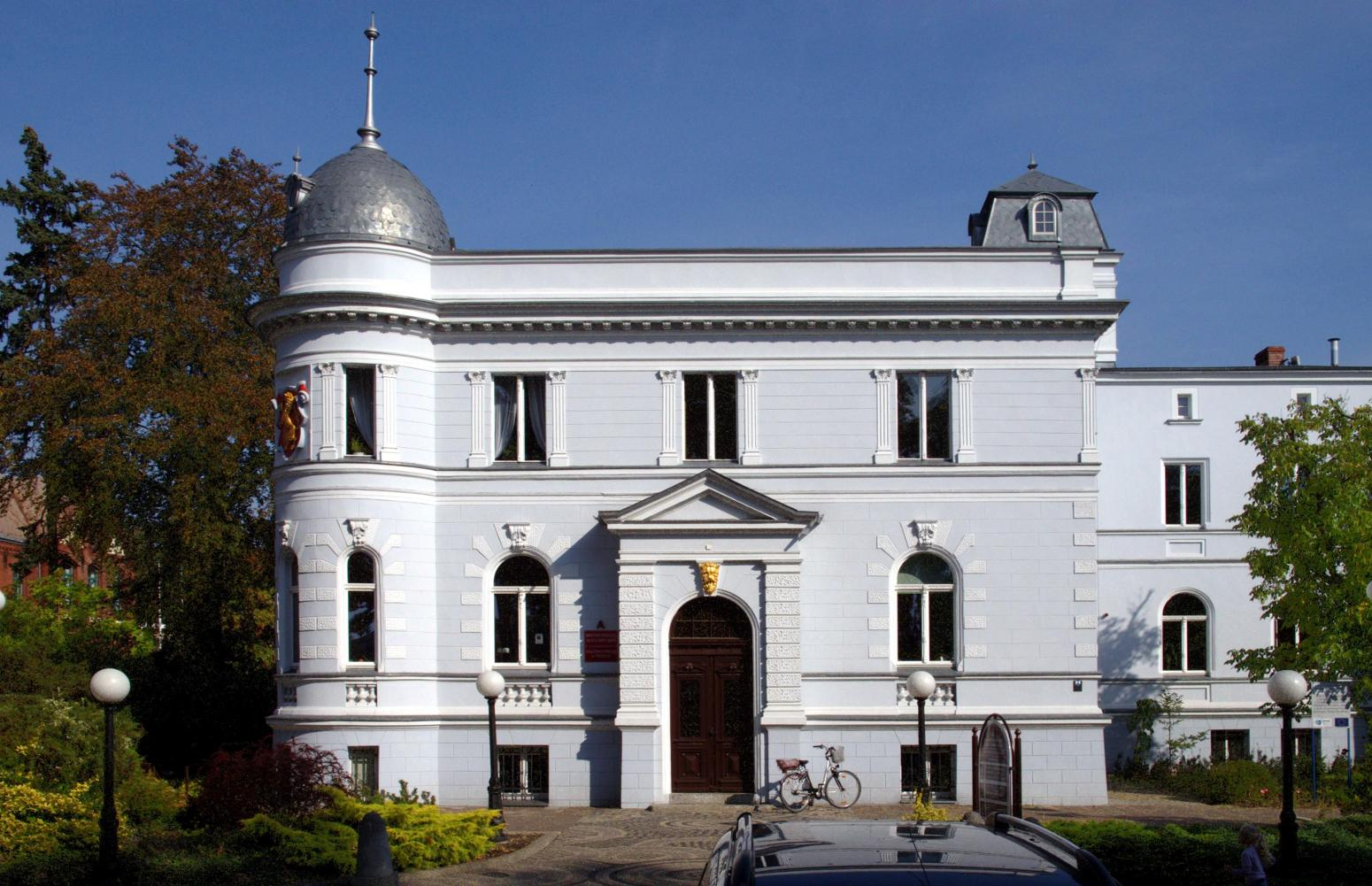 Dębno - willa, ulica Mickiewicza 32, obecnie biblioteka (zabytek nr rejestr. 35)